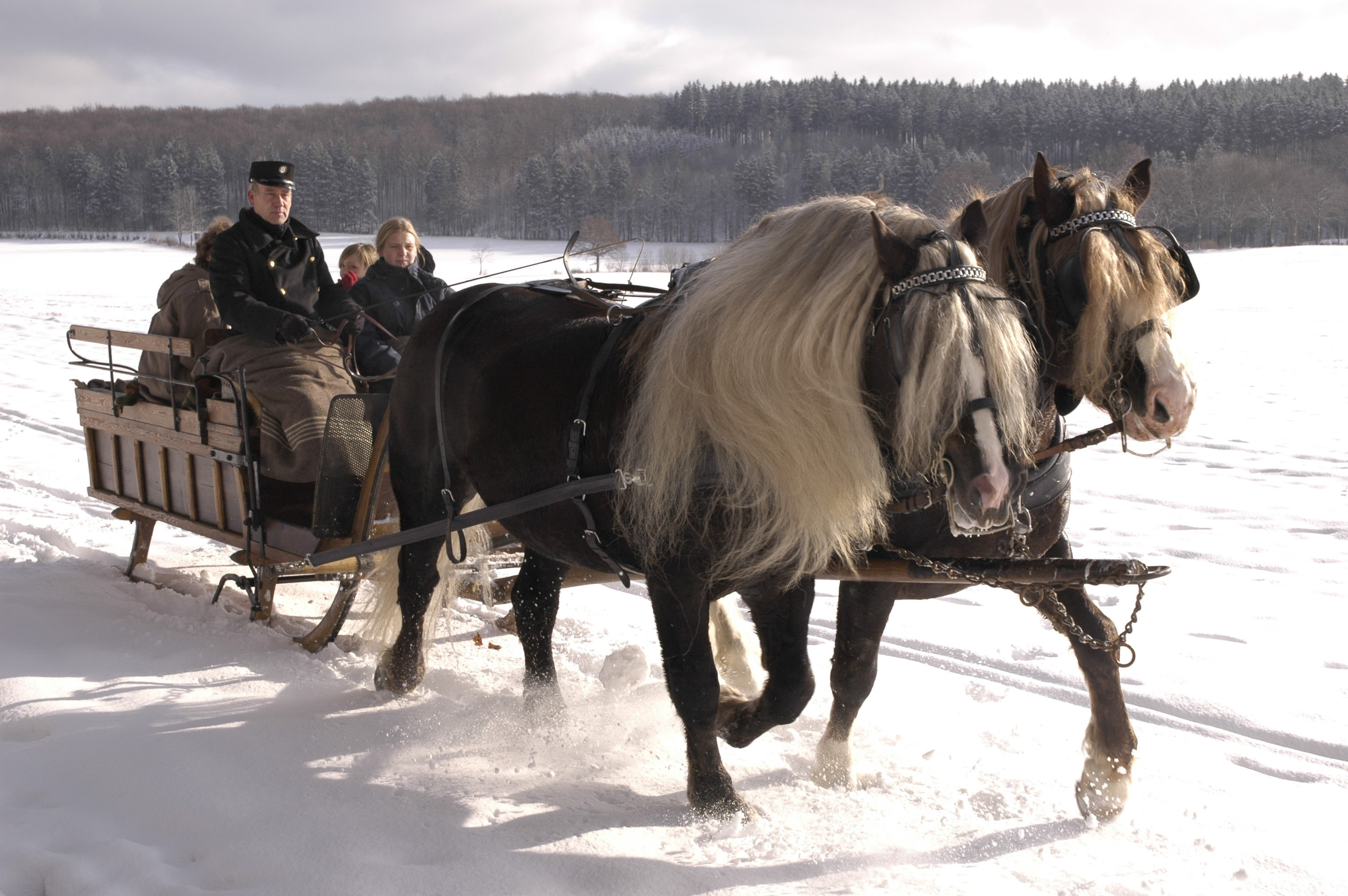 horse pulled sled